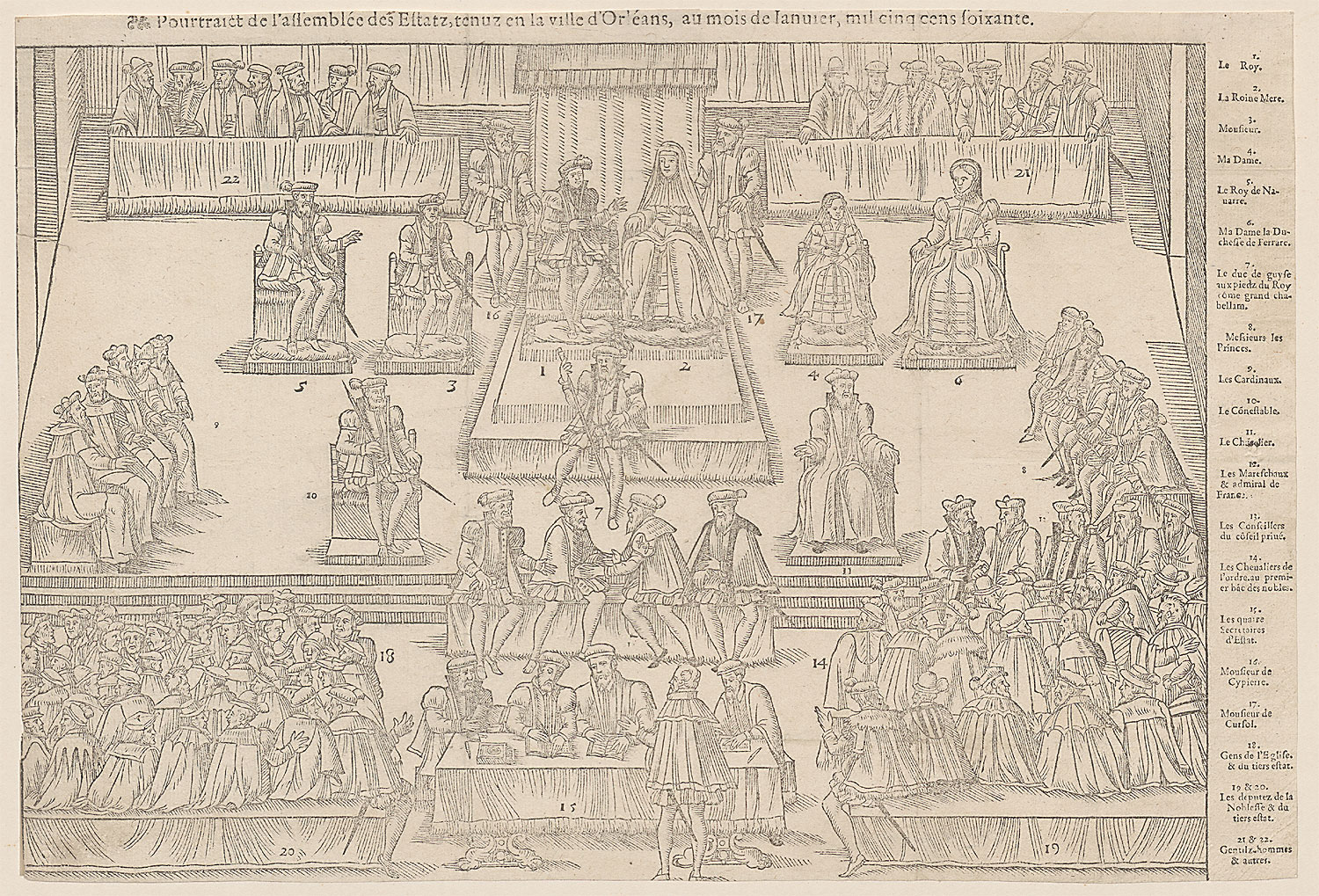 Le Portraict de l'assemblée des estatz, tenuz en la ville d'Orlean ...; Holzschnitt, nach 1560